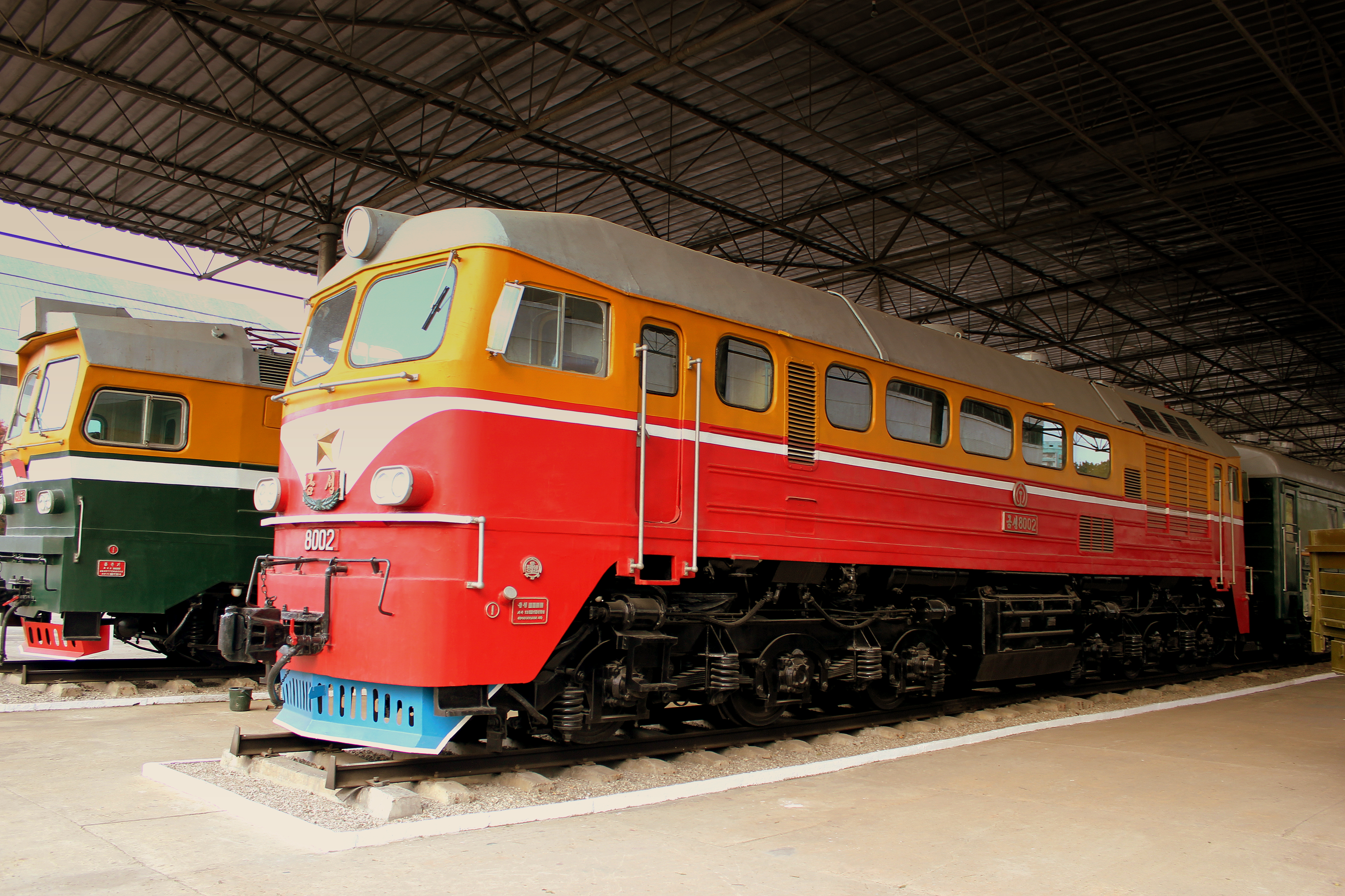 RUSSIAN BUILT NORTH KOREAN RAILWAYS LOCOS AT THE PYONGYANG SCIENCE AND TECHNOLOGY MUSEUM DPR KOREA OCT 2012